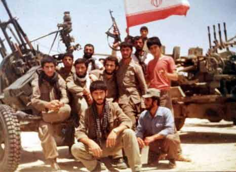 عملیات ثامن الائمه